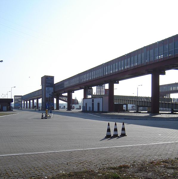 Widok na Terminal Promowy w Świnoujściu